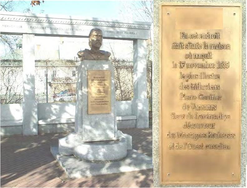 Buste de Lavérendrye